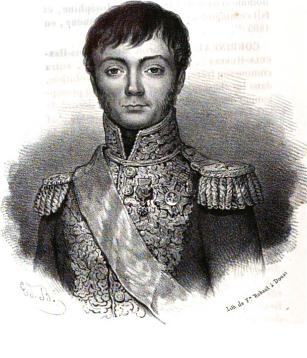 Jean-Baptiste Juvénal Corbineau (1770-1858), général d'Empire